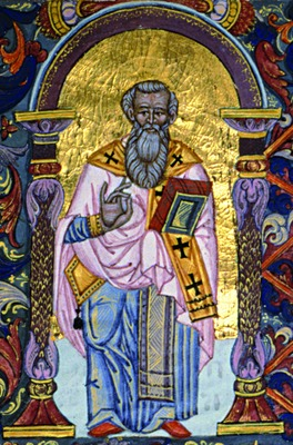 Свт. Григорий Великий. Миниатюра из Служебника. Мастер Андрейчина. 30-е гг. XVI в. (ГИМ. Воскр. 3-бум. Л. 109а)